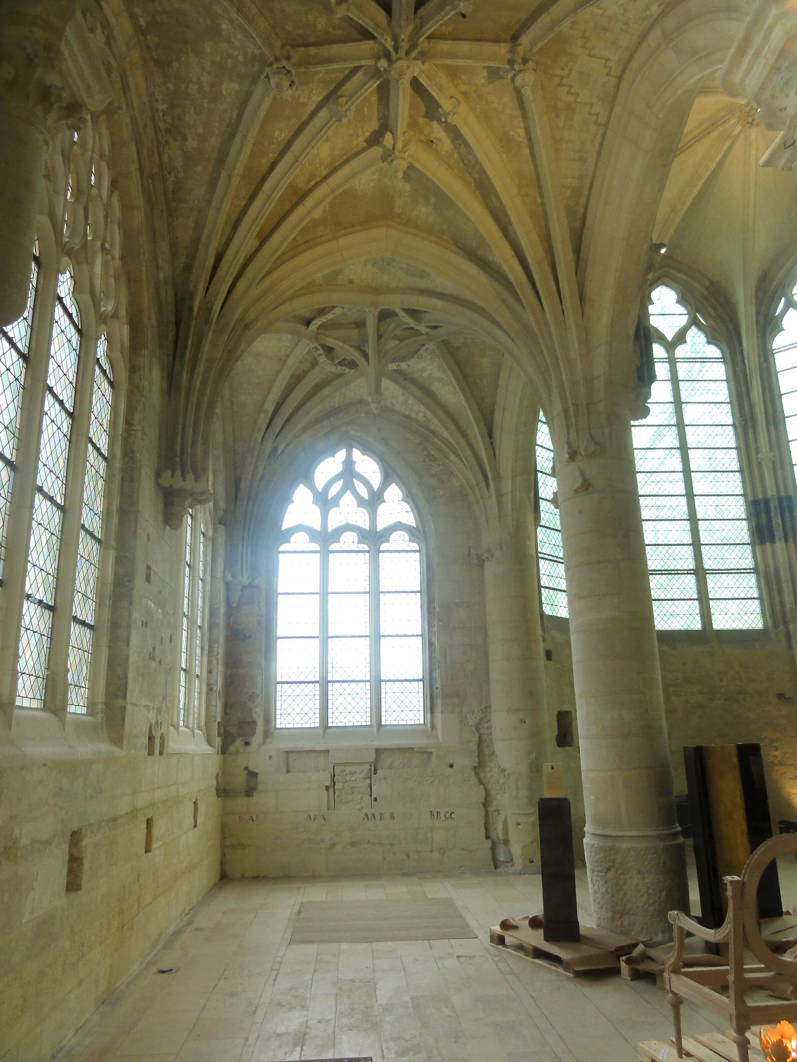 Intérieur de l'église - voir titre.